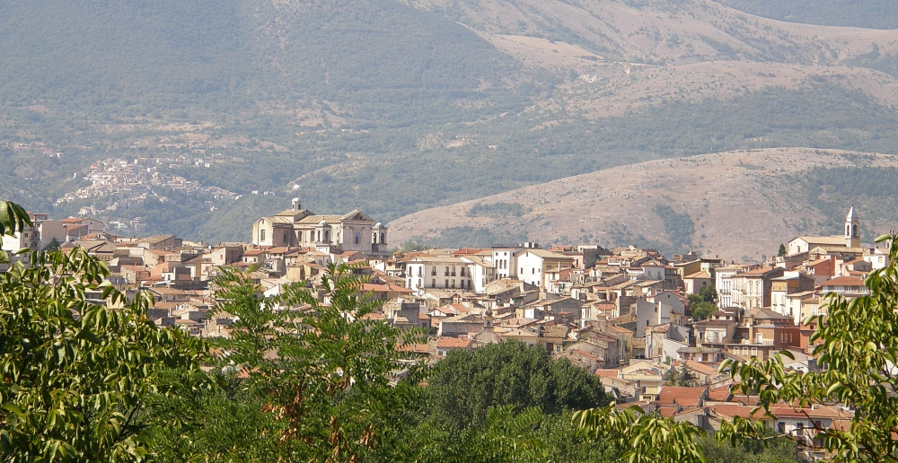 Paratola Peligna